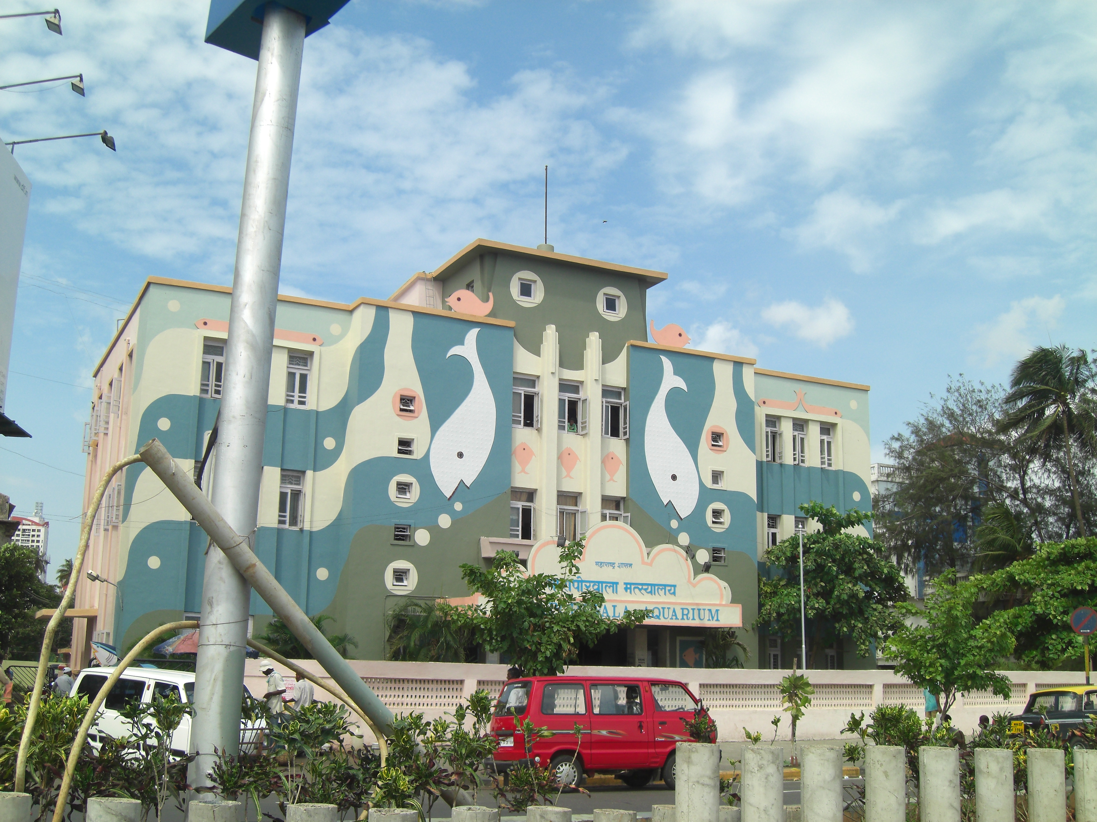 Aquarium mumbai